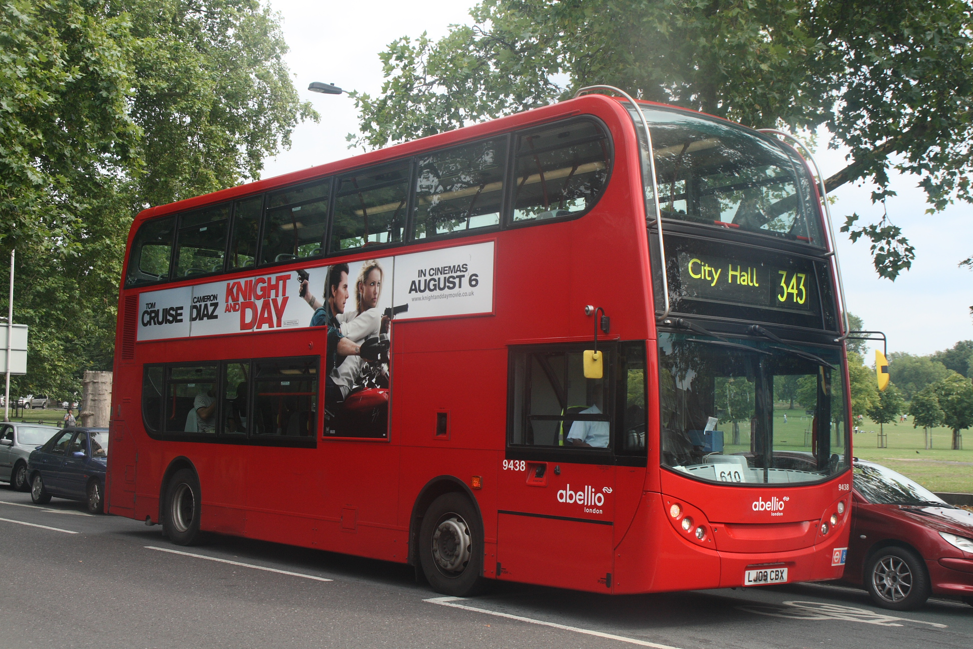 DPP_0017